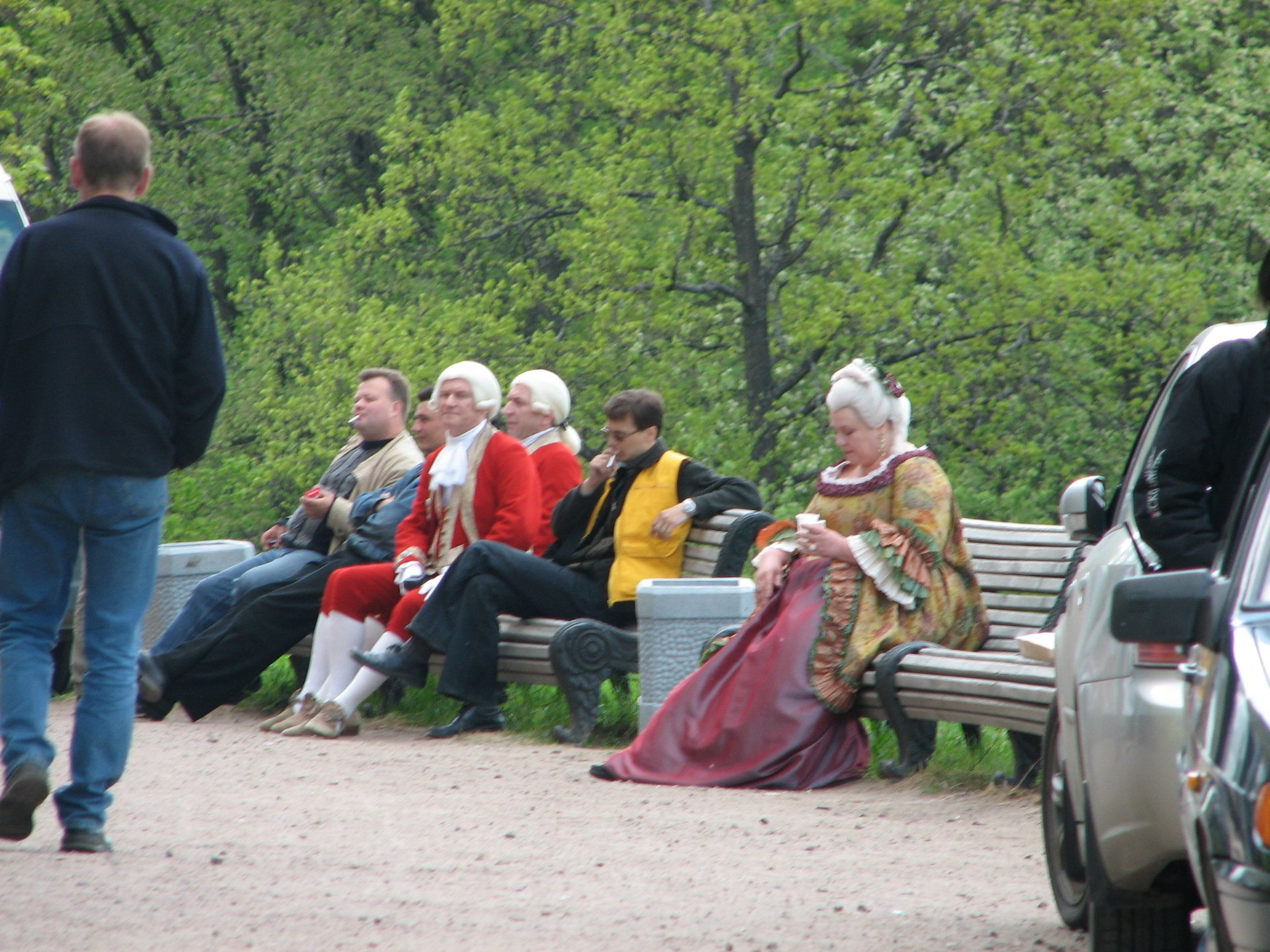 Съёмки неизвестного фильма около Большого Гатчинского дворца